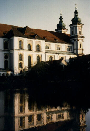 Basilika Fotograf: Walter J.Pilsak Copyright Status: GNU Freie Dokumentationslizenz